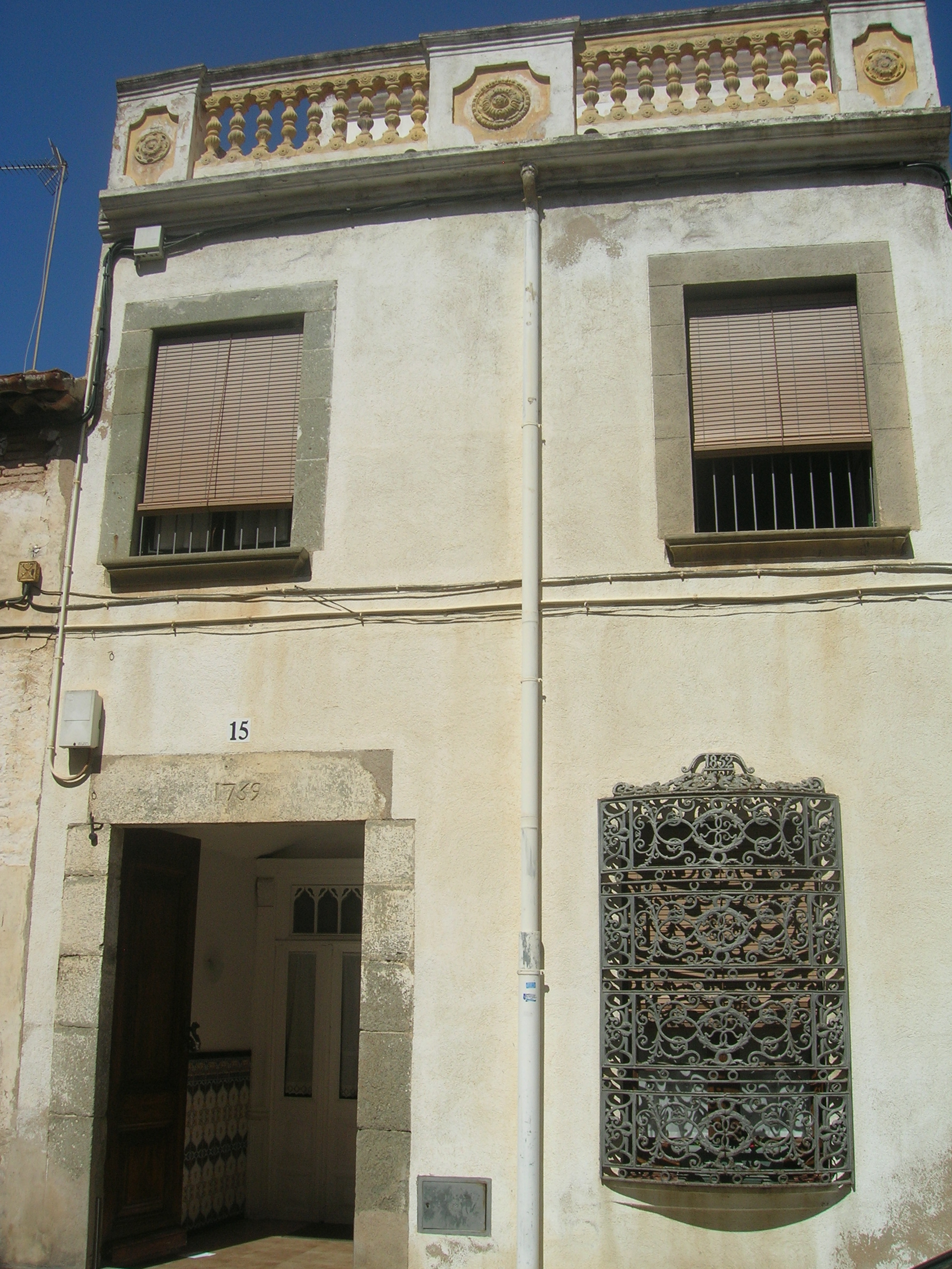 Habitatge al carrer Sant Francesc, 15 (Vilassar de Mar)